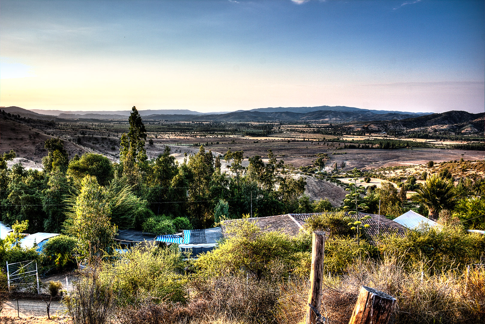 Un Paseo por el Tiempo Rincon las Higueras, Pumanque 2014 VI Region